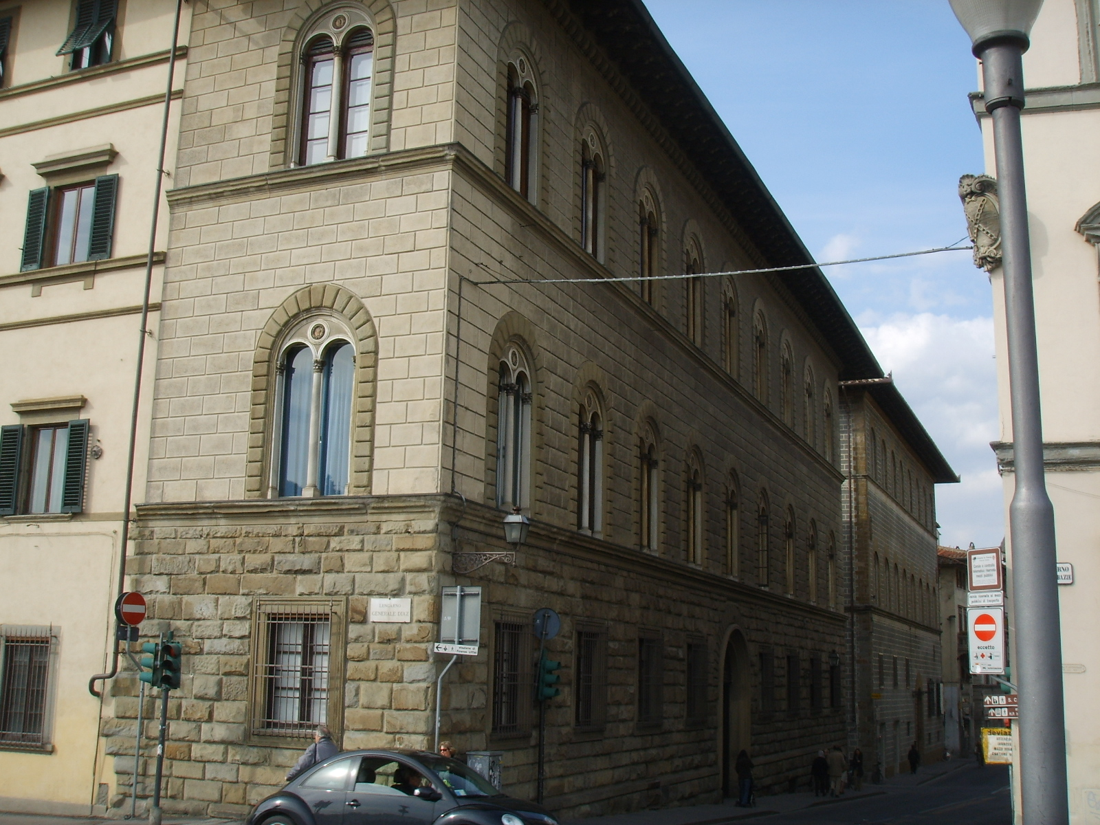 Palazzo malenchini-alberti